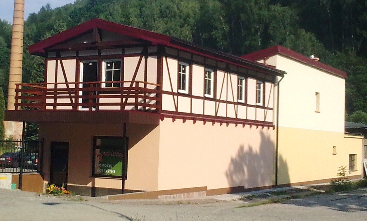 ZPJ "Nowar". Nowa Ruda